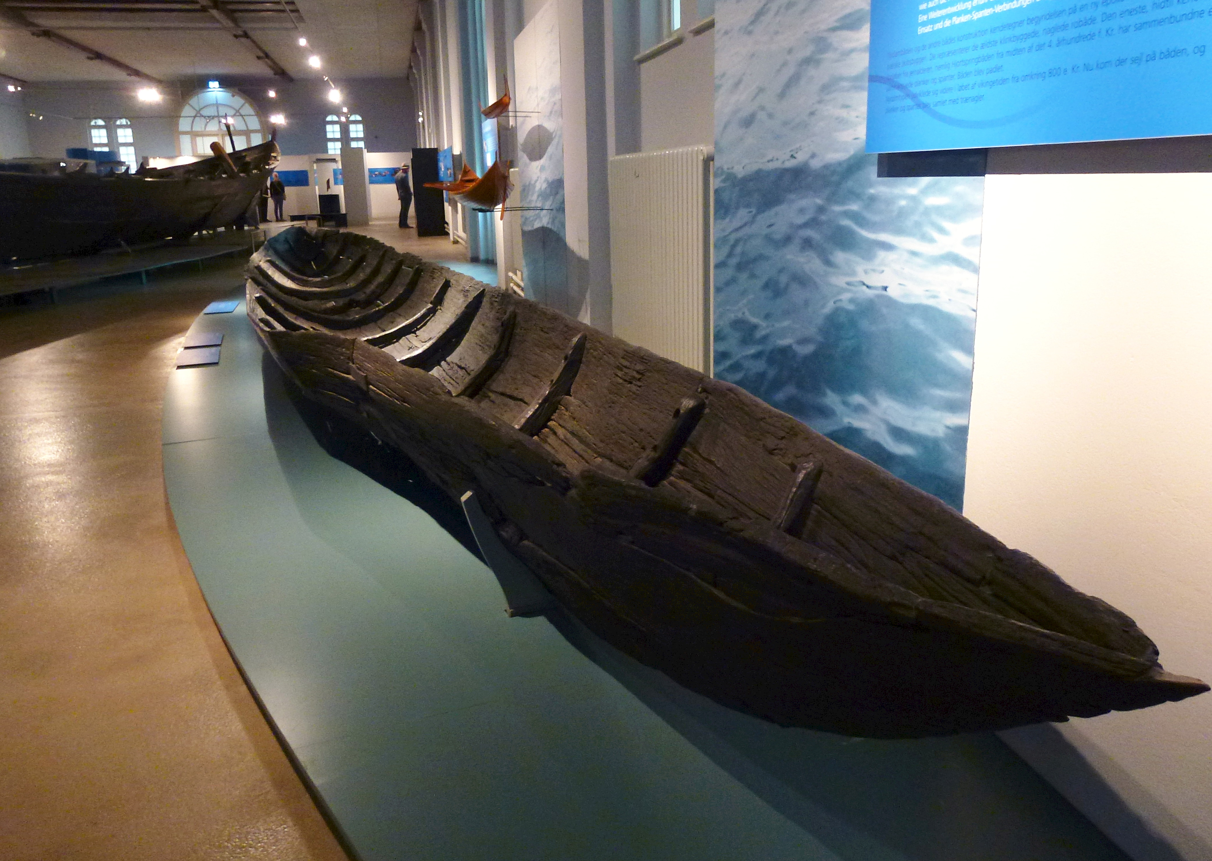 Der Vaaler Einbaum in der Nydam-Halle des Archäologischen Landesmuseums in Schloss Gottorf, Schleswig